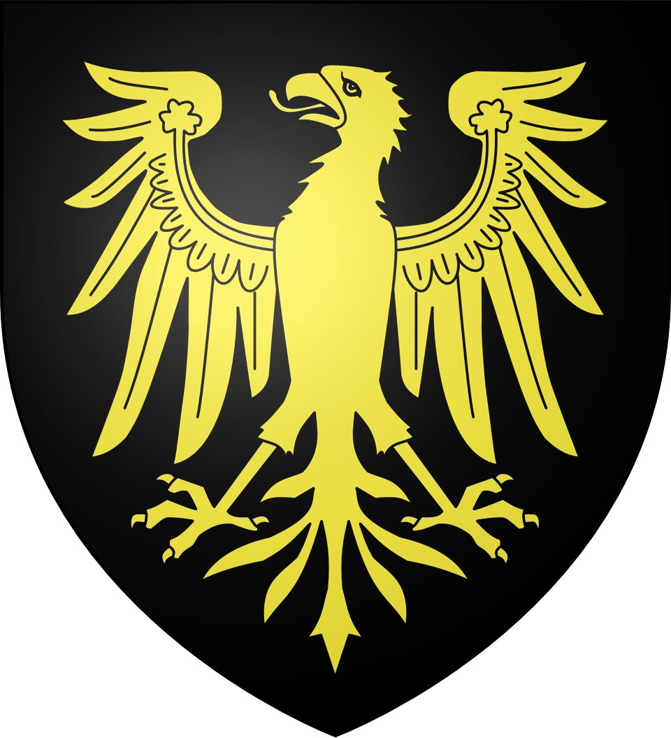 Blason de la ville de Chaux (Territoire de Belfort) : De sable à l'aigle d'or